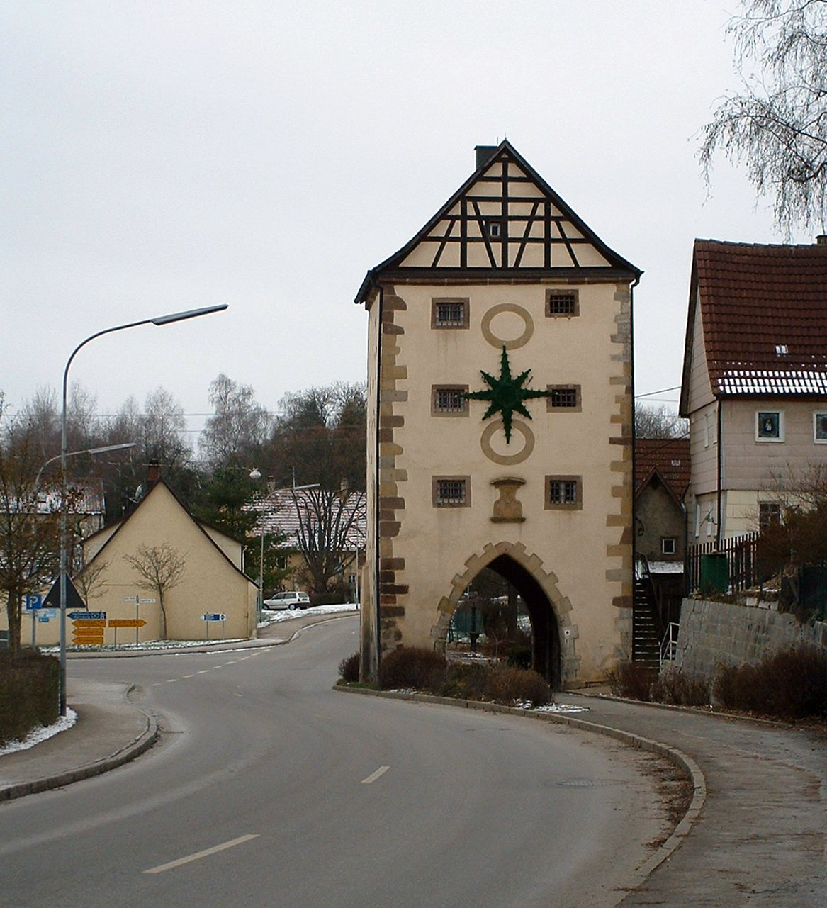 Stadttorvon Gerabronn